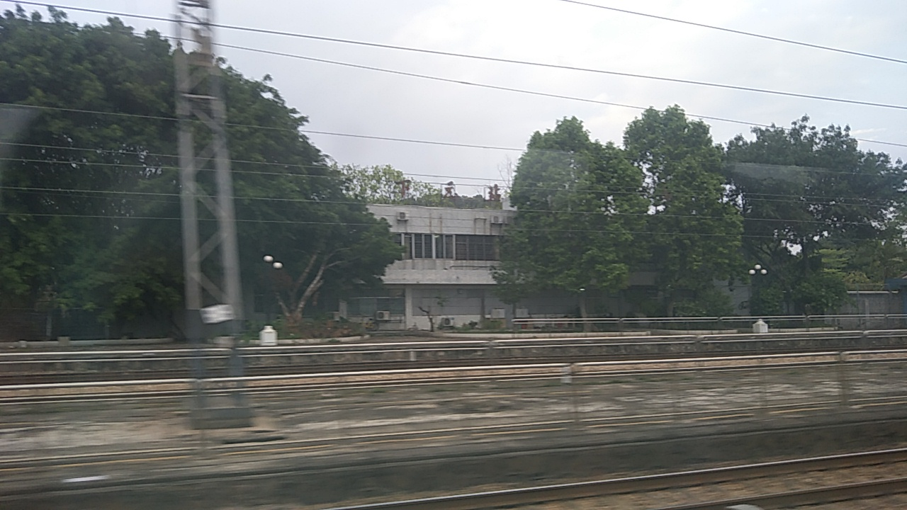 下元站大楼